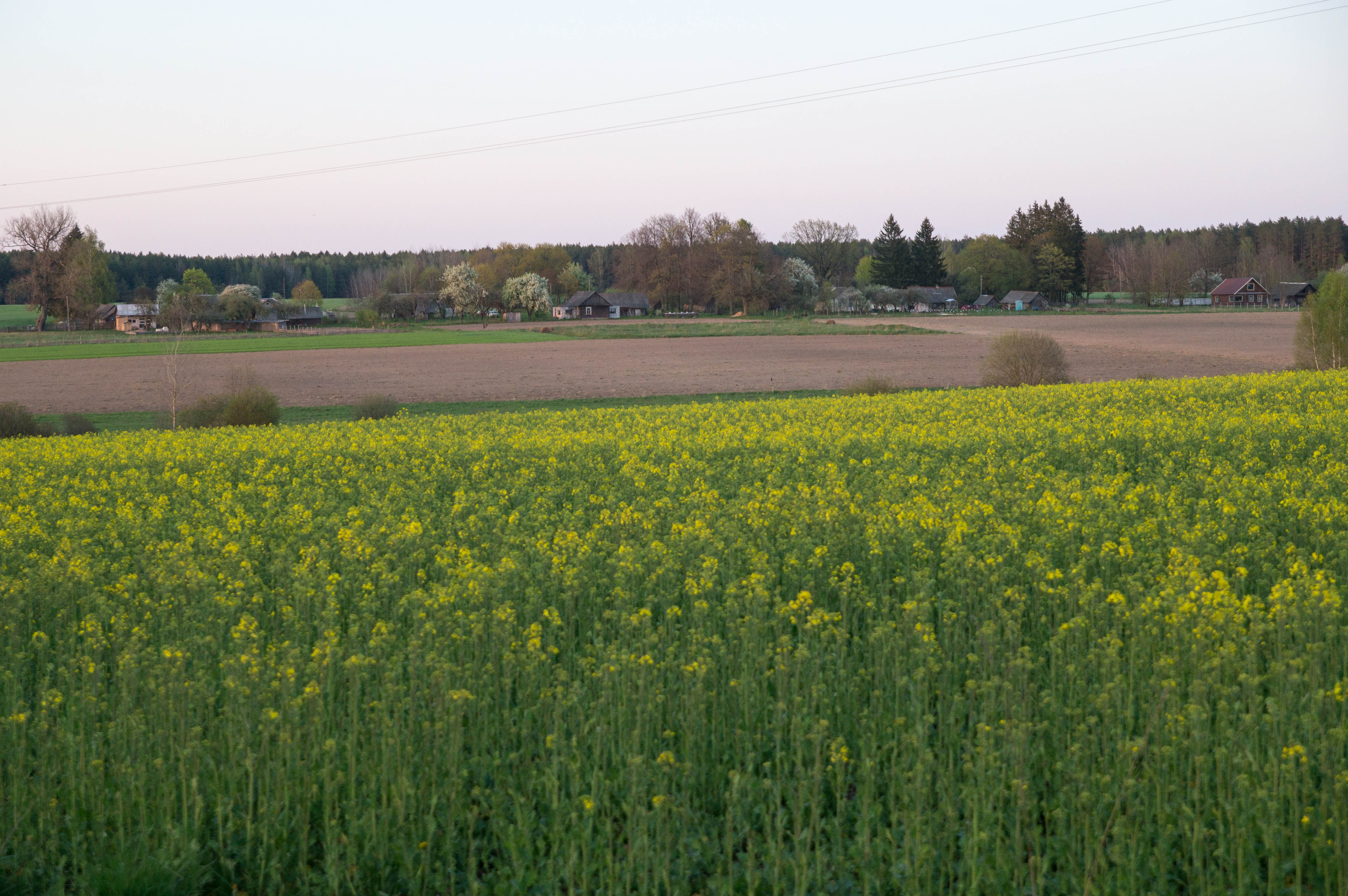 Рушчыцы. Від з паўднёва-заходняга боку